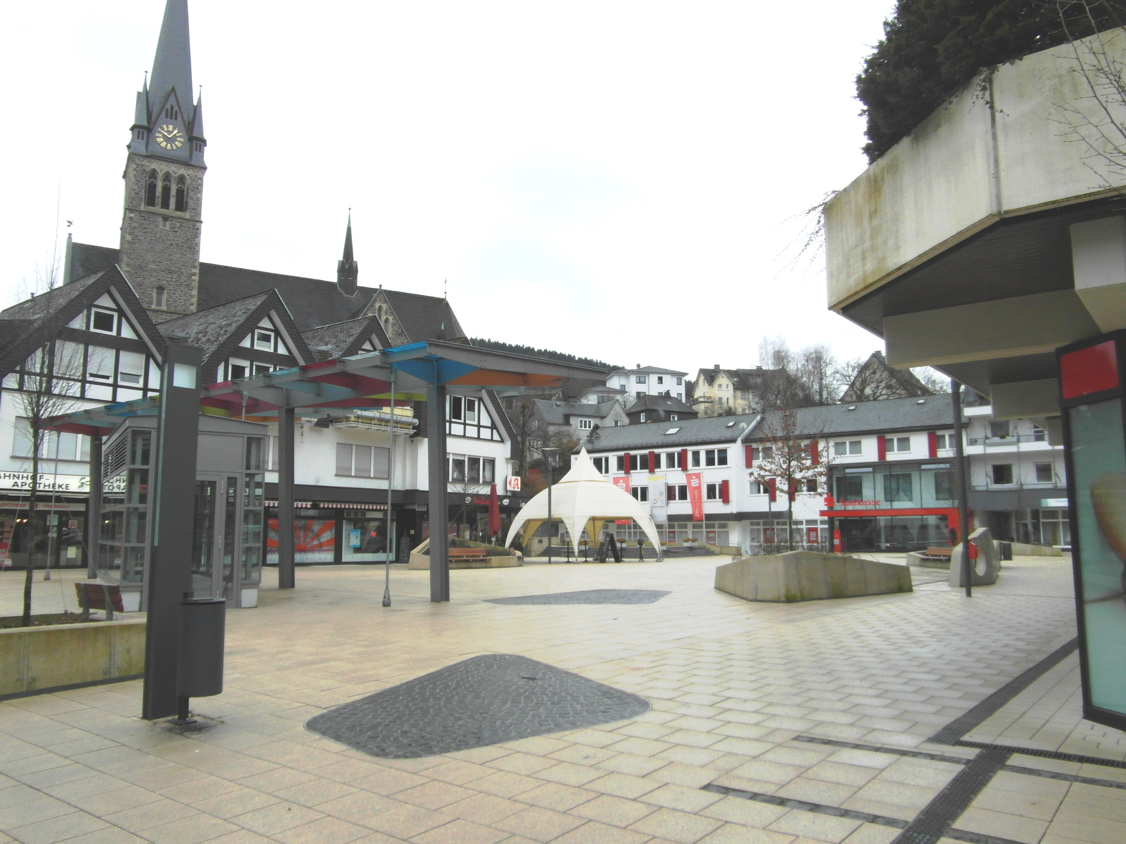 In den Jahren 2013/14 erneuerter Marktplatz in Altenhundem